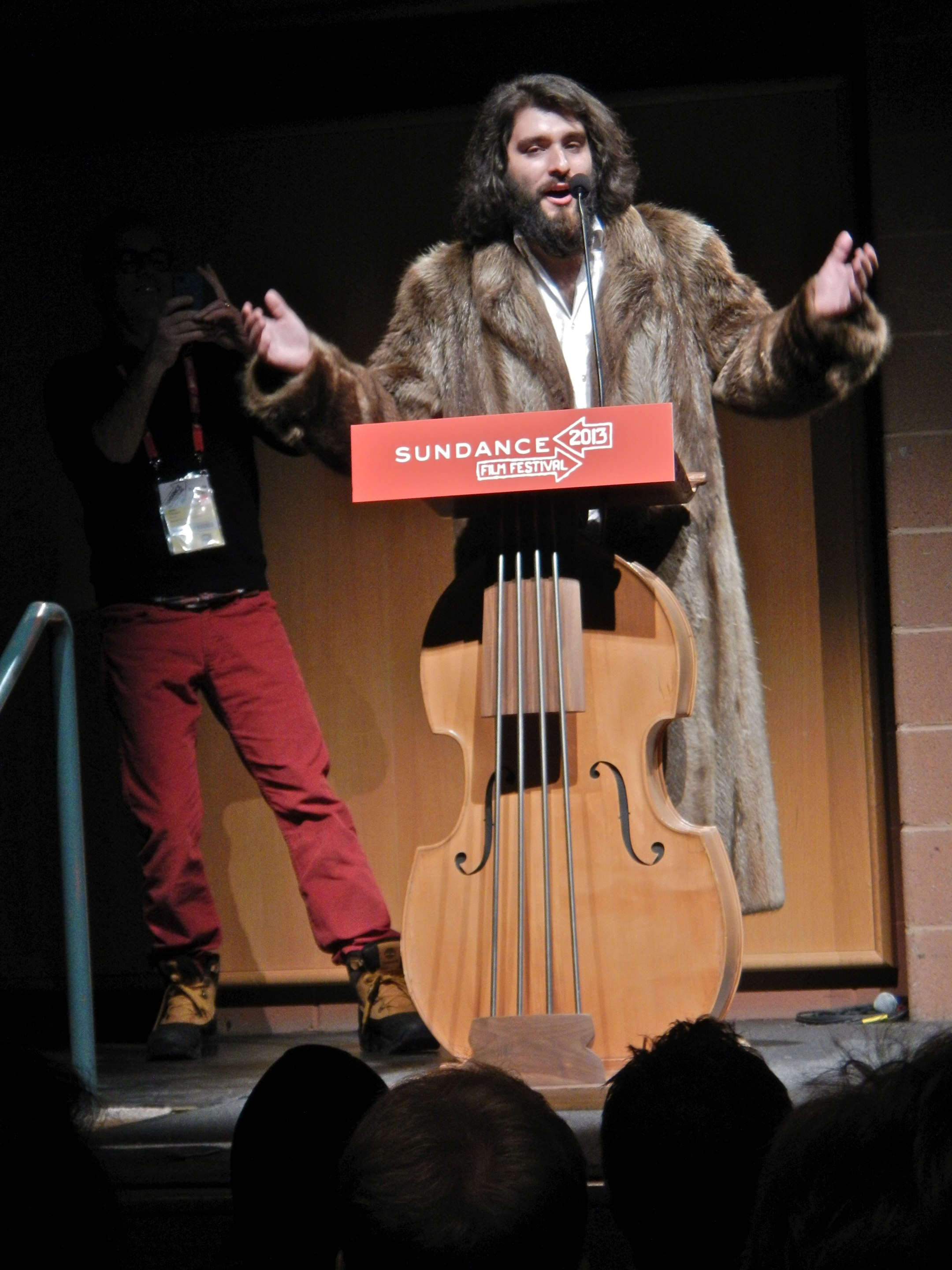 Sundance 2013